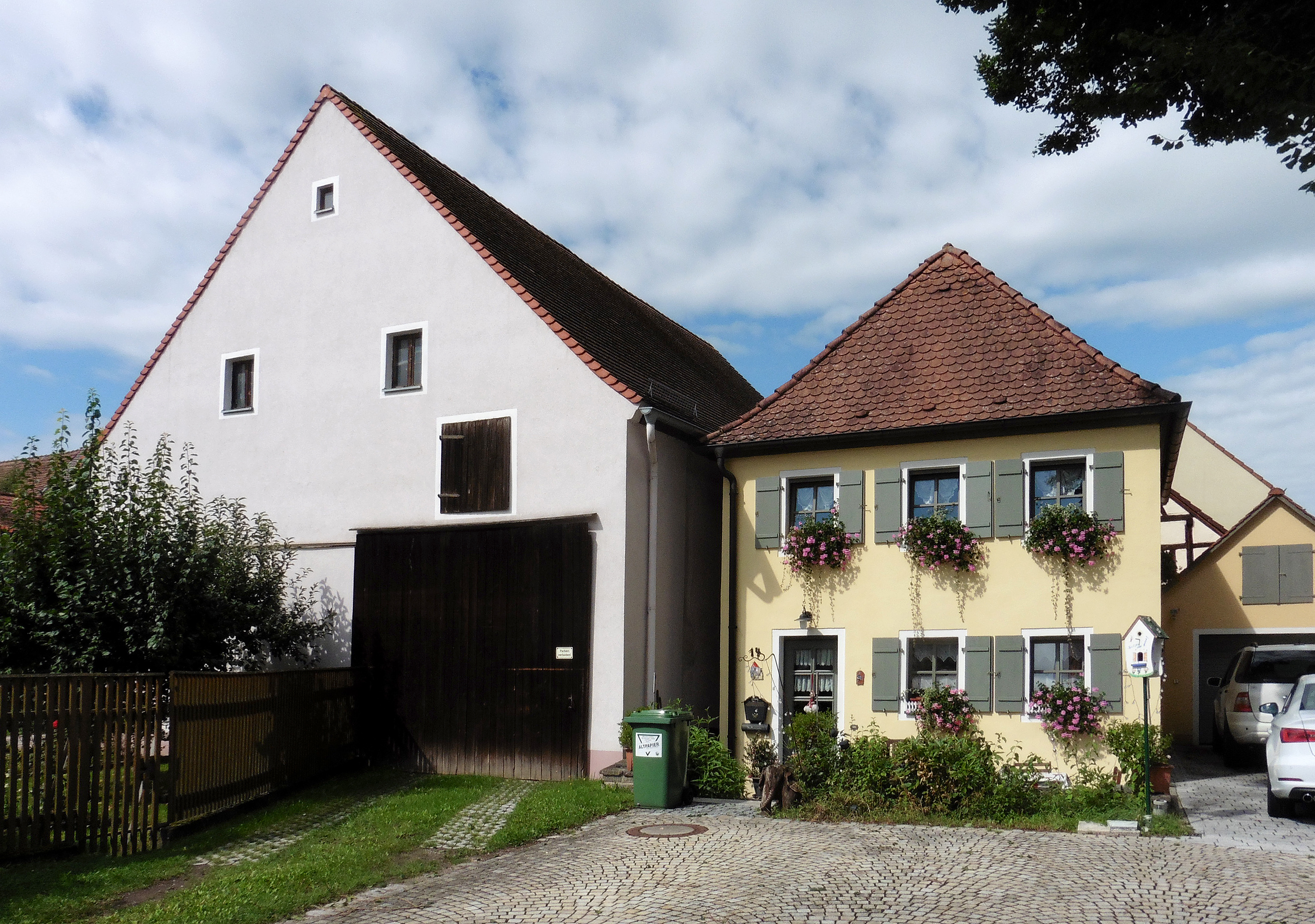 Rechts im Bild das sogenannte Jungfernhäusl oder Jungfernhaus (ehemaliges Amtsknechthaus) An der Stadtmauer 14 in Herrieden im Landkreis Ansbach. An der Stelle der links daneben stehenden Scheune befand sich das 1956 abgebrochene Armenhaus, das spätestens ab 1617 als Hexengefängnis diente. Ansicht von Osten. This is a photograph of an architectural monument.